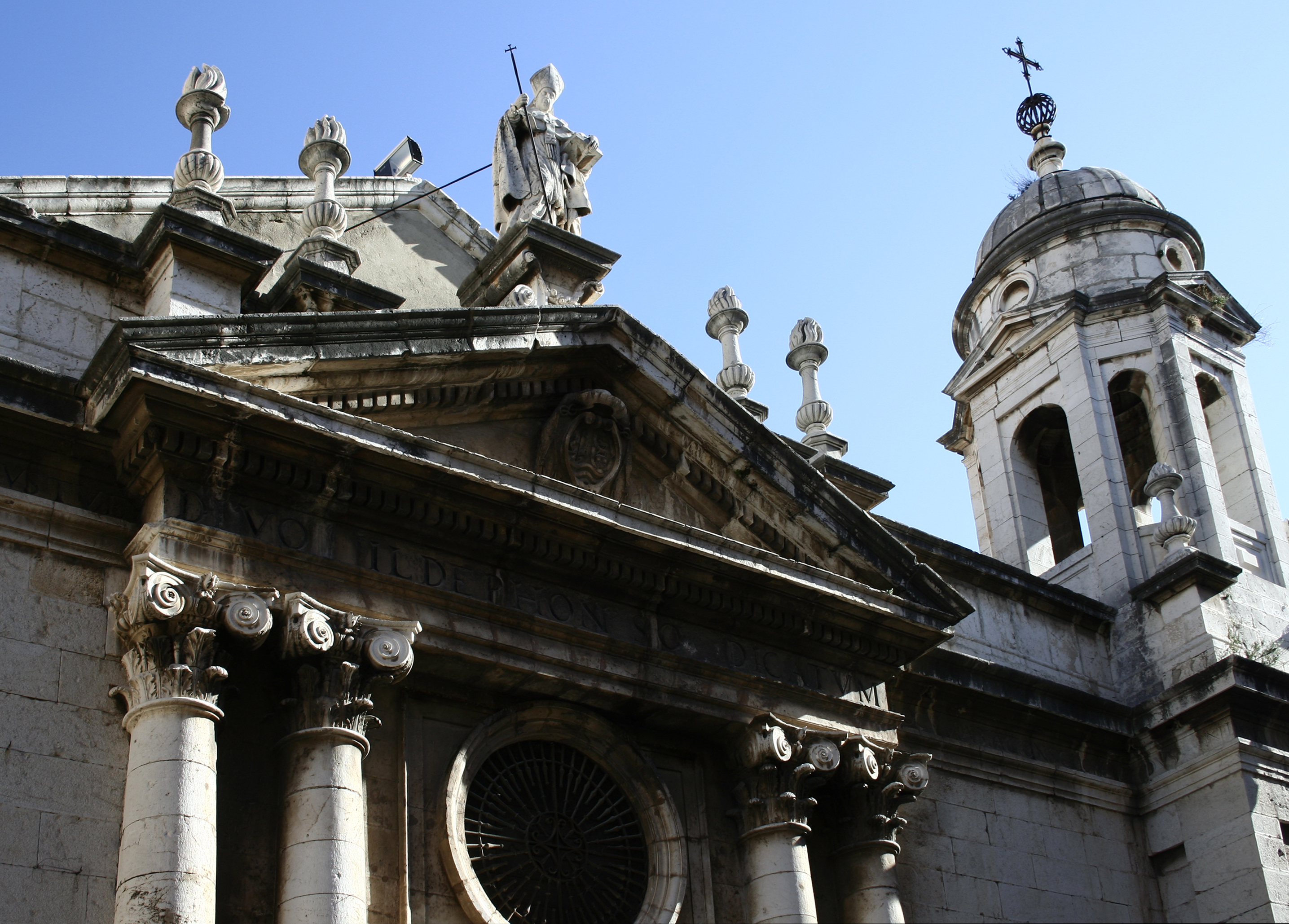 архитект Андрес де Ванделвира